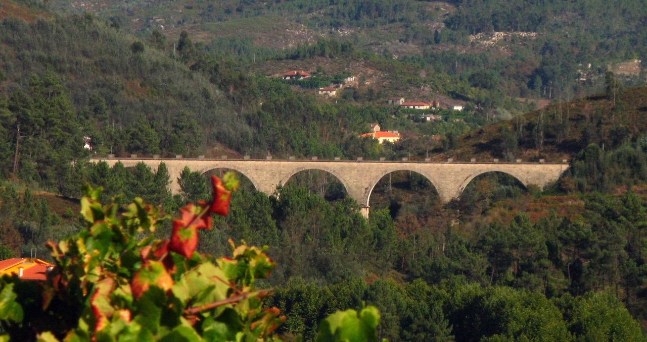 Antiga ponte ferroviária da Linha do Tâmega. Fotografia tirada da estrada acesso ao restaurante Sabores da Quinta em Molares 29 de Agosto de 2009